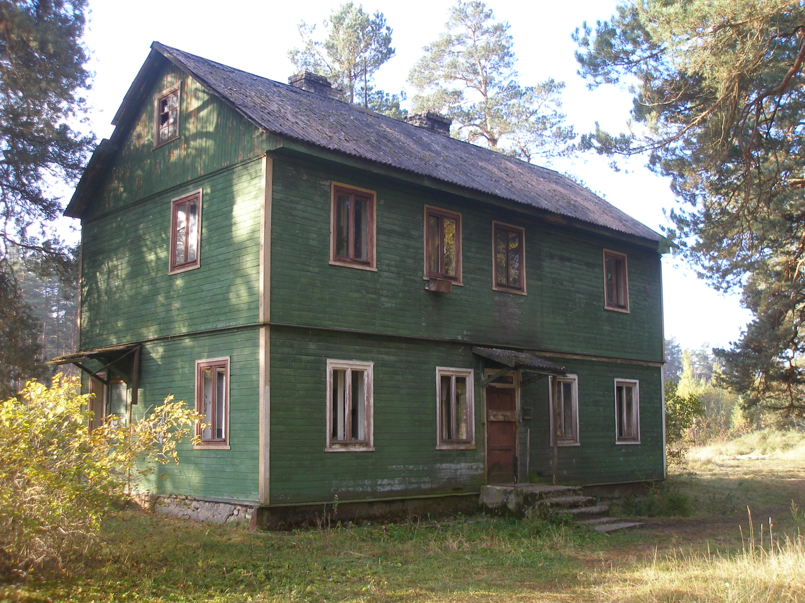 Cekules stacijas ēka